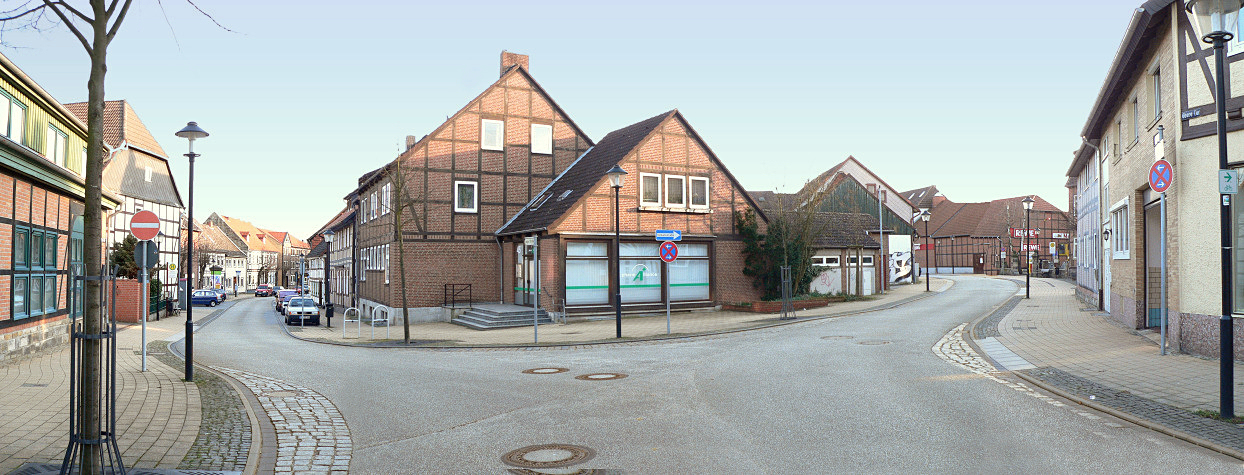 Vorsfelder Langestraße und Amtsstraße